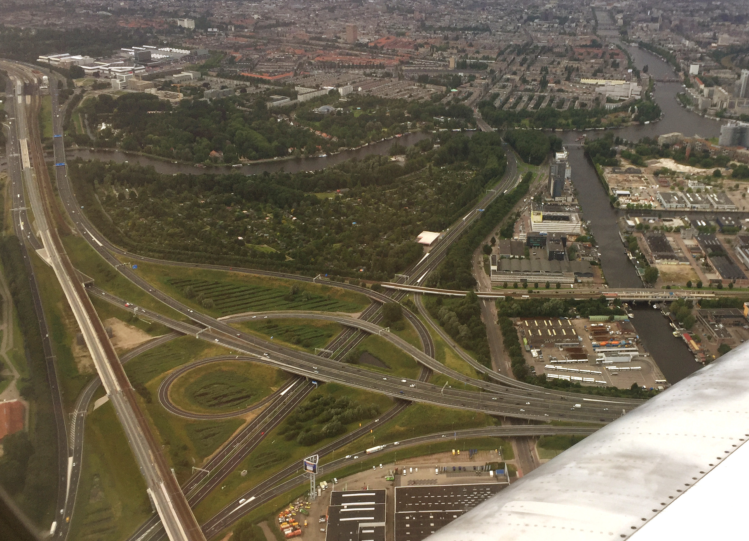 Knoopunt Amstel gezien naar het noordwesten. Juli 2016